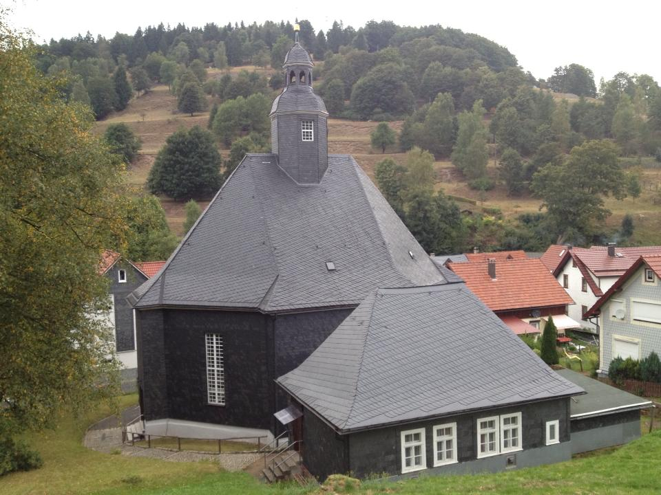 Kirche in Gießübel am Rennsteig